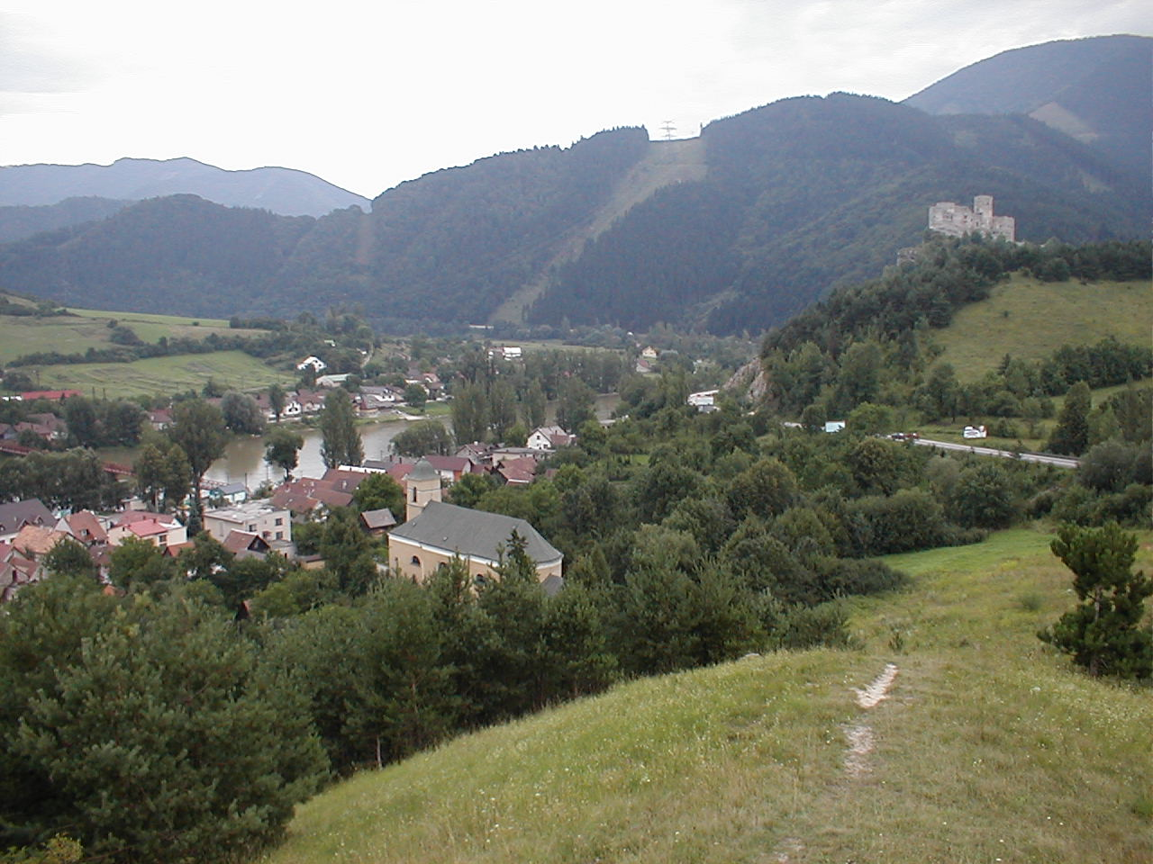 Durchbruch der Waag (Vah) bei Sillein (Zilina), mittl.Slowakei selbst fotografiert 2003 mit Olympus 840 Geof 22:23, 23. Sep 2006 (CEST)